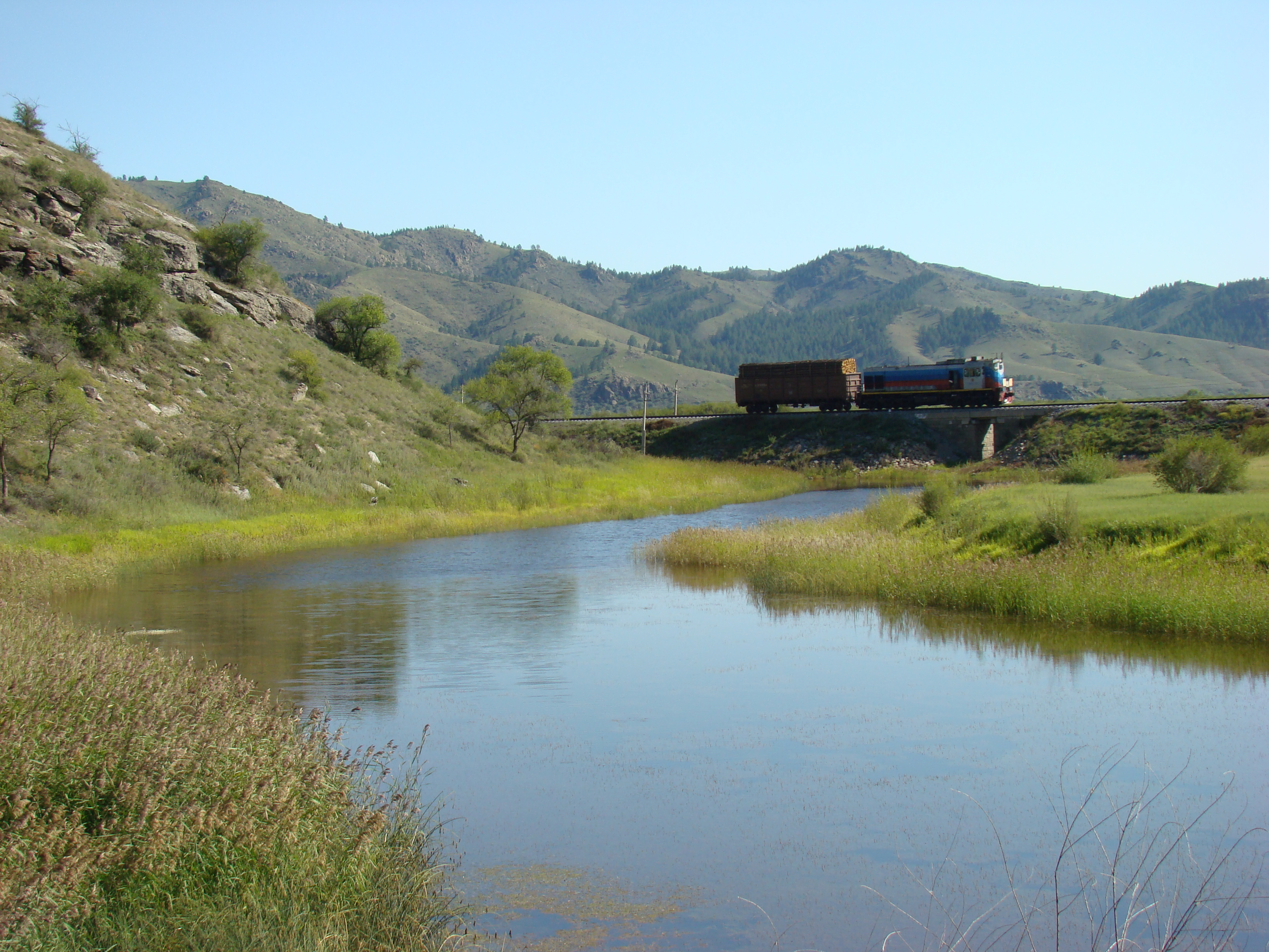 Село Зарубино. За Кривой.